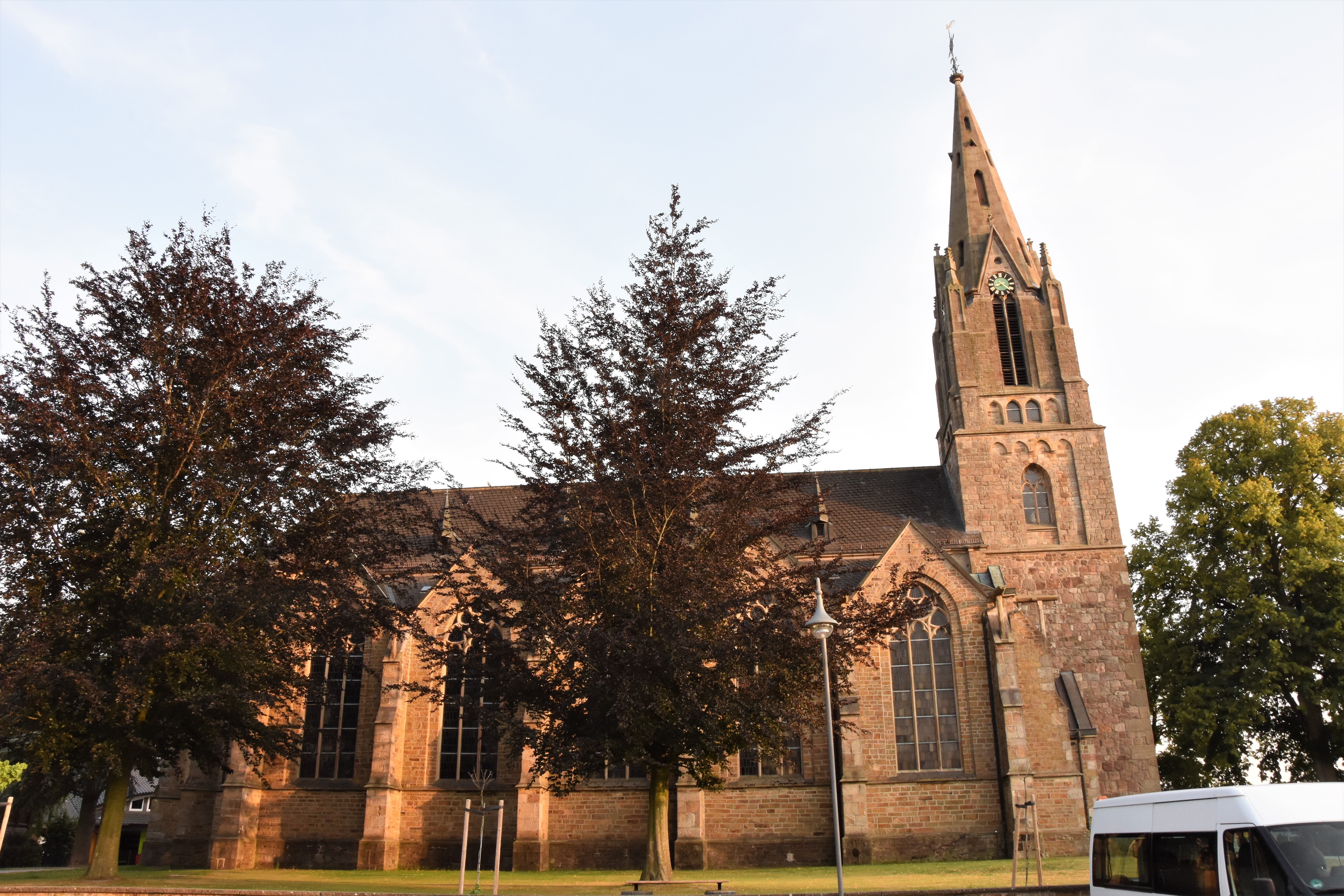 Die kath. Kirche St. Lambertus (Merzen) am 25-07-2019.